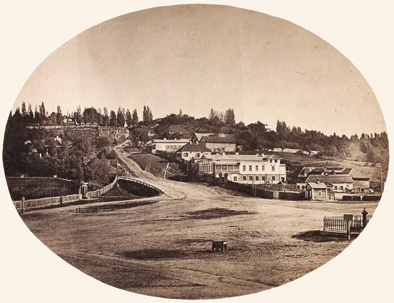 Бессарабська площа, Крутий узвіз і поворот на Круглоуніверситетську вулицю